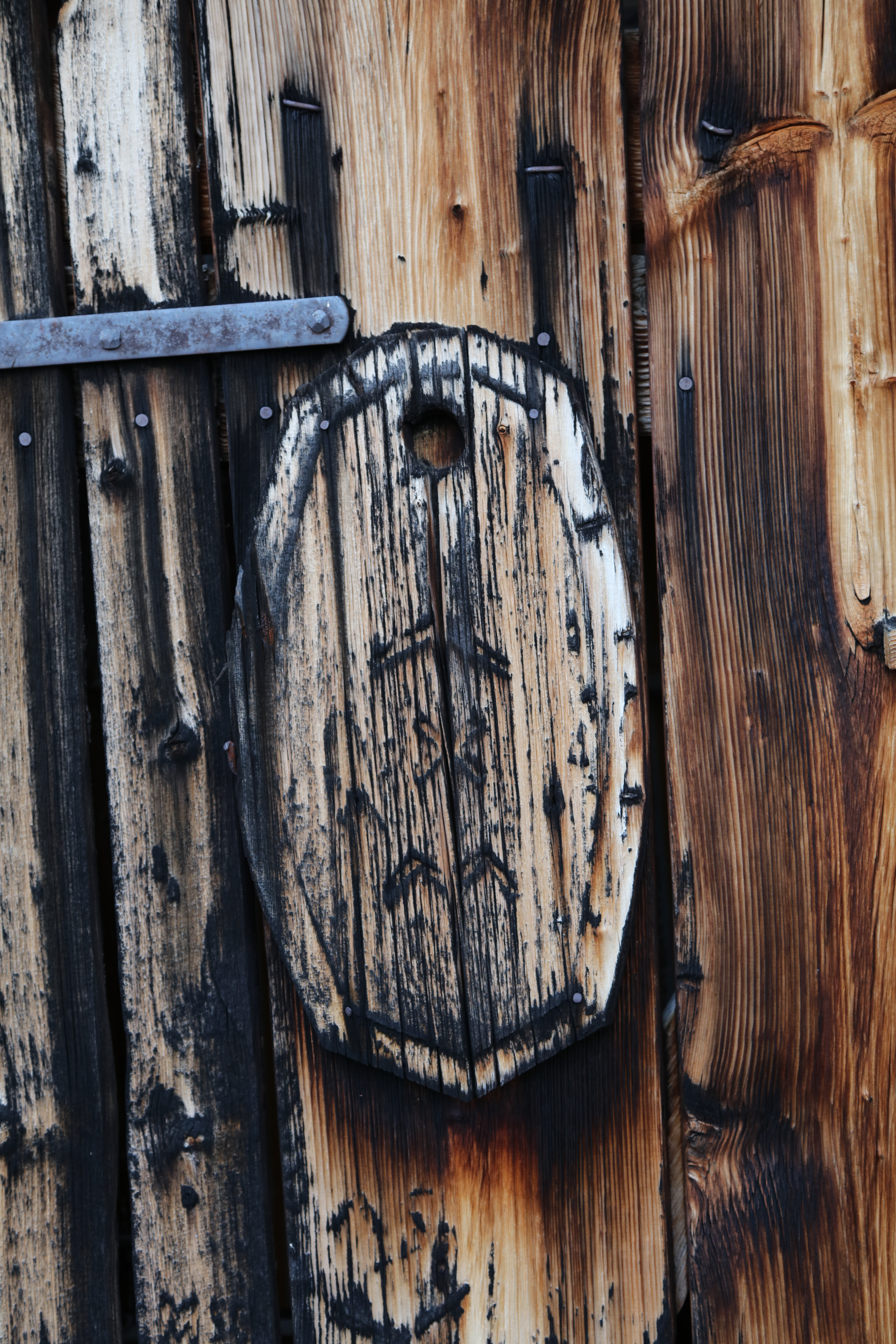 Aussenaufnahmen von der Alphütte auf der Stafelalp oberhalb Davos in der Ernst Ludwig Kirchner 1917 wohnte.